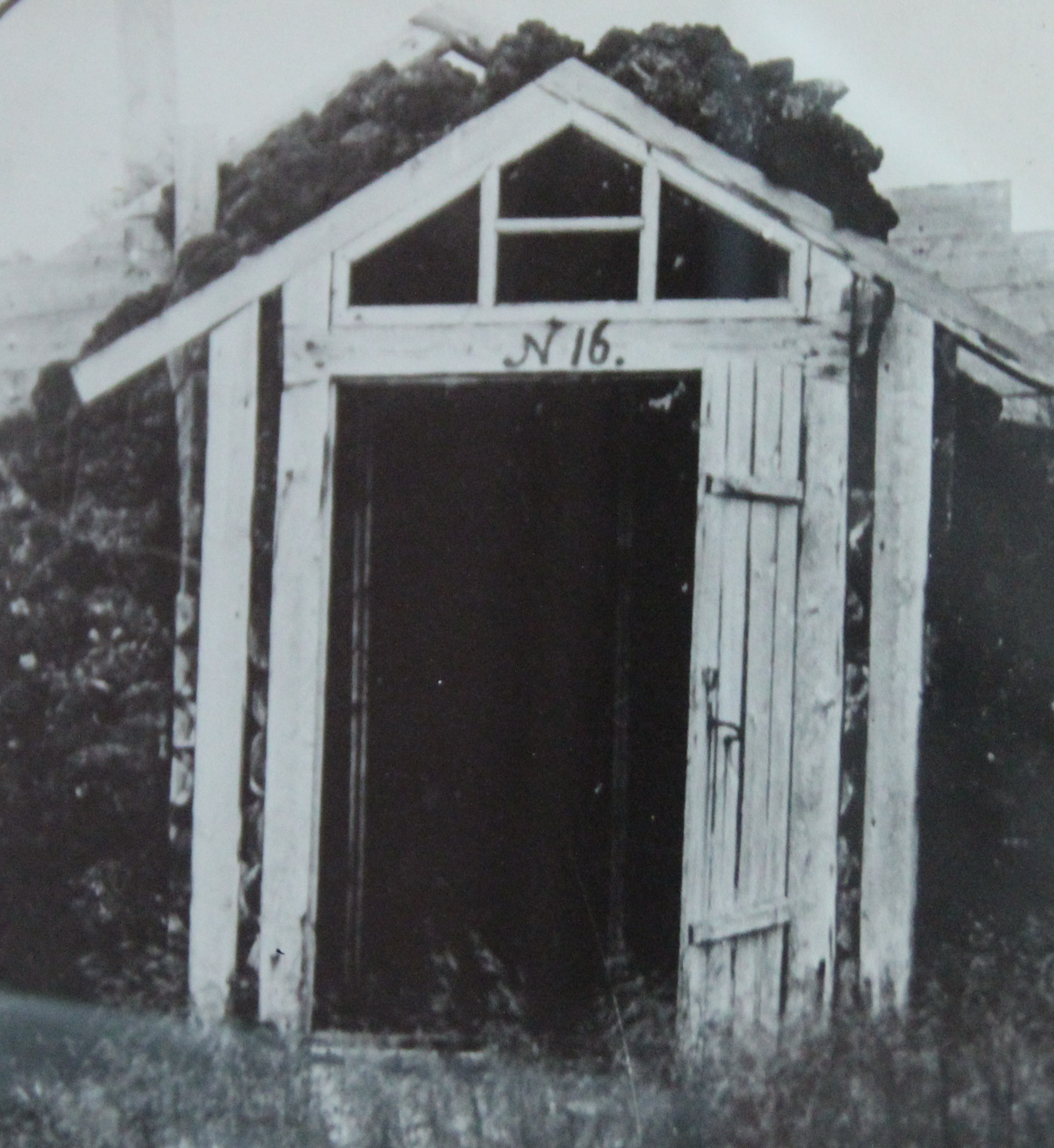 Карцер в Йоканьгской тюрьме 1919